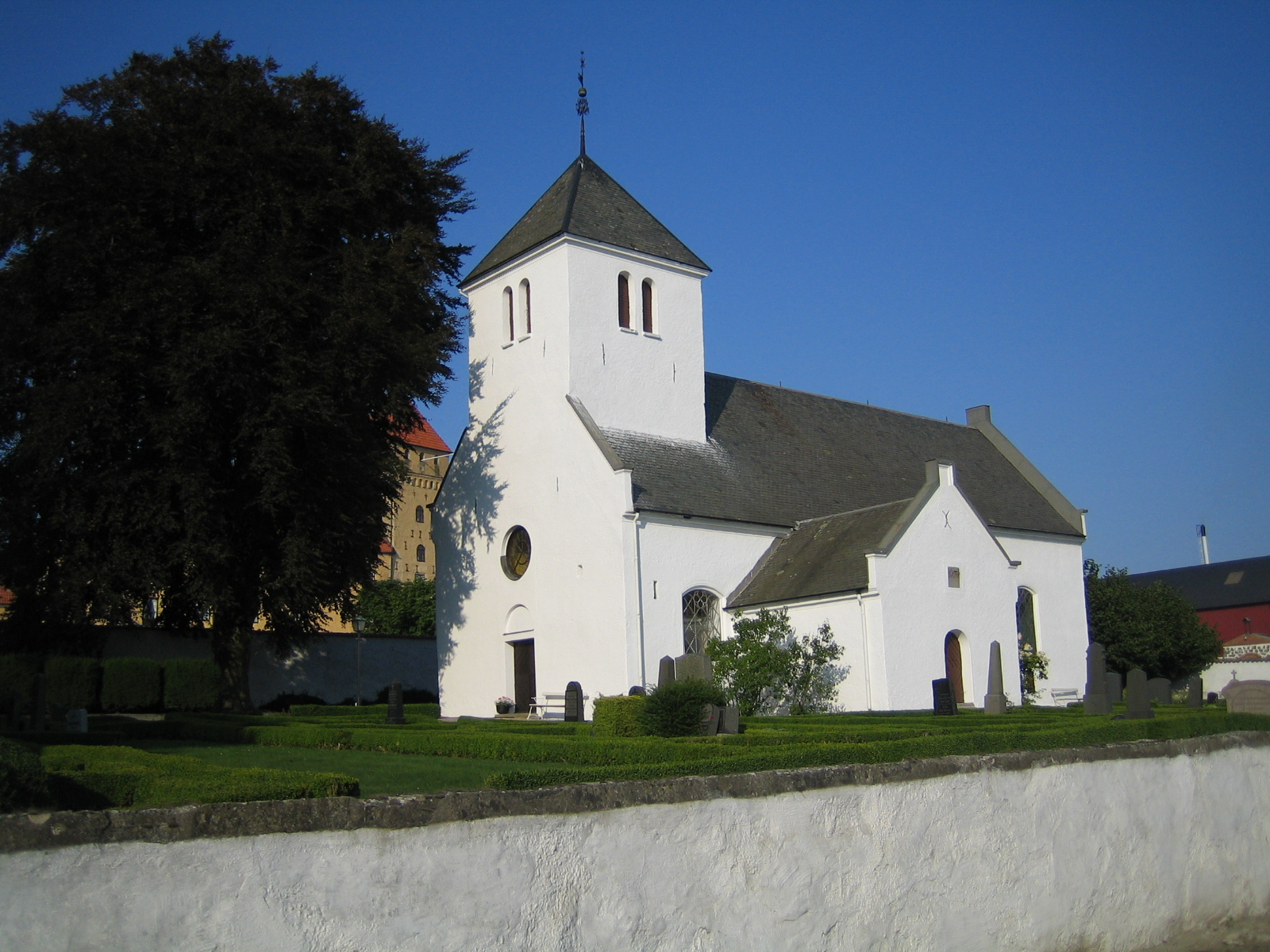 Tosterups kyrka